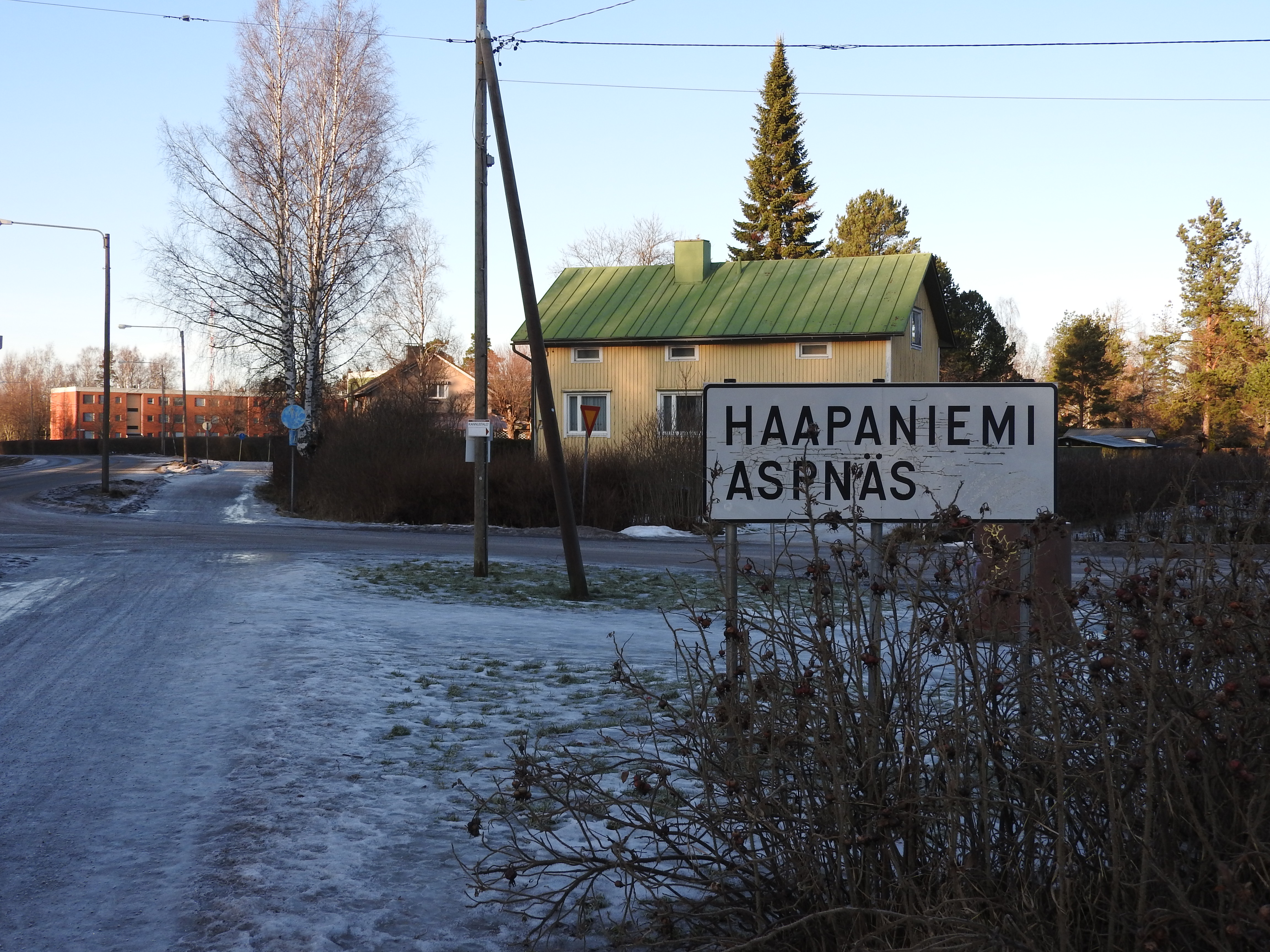 Haapaniemen kyltti Vaasassa talvella 2017